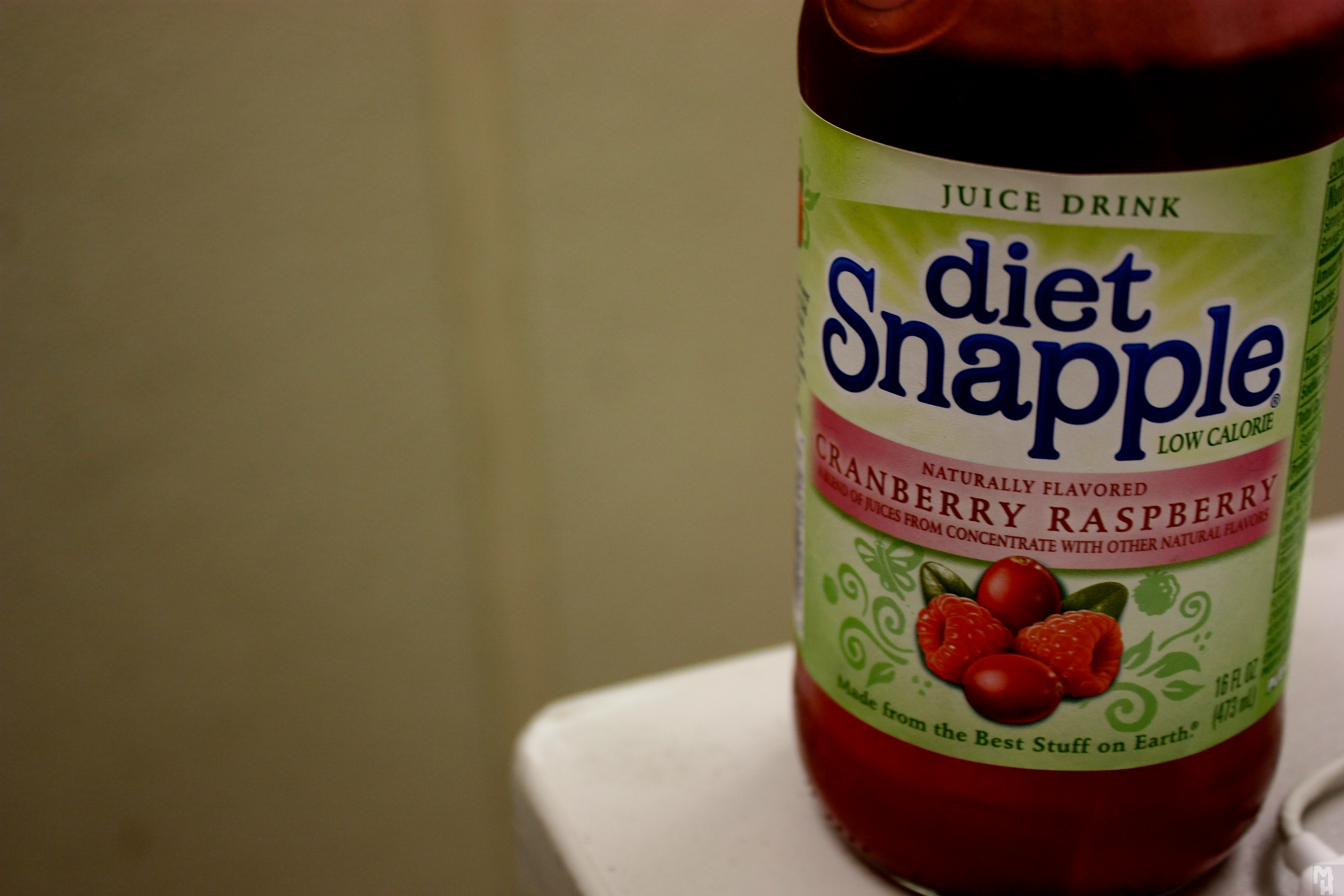 Diet